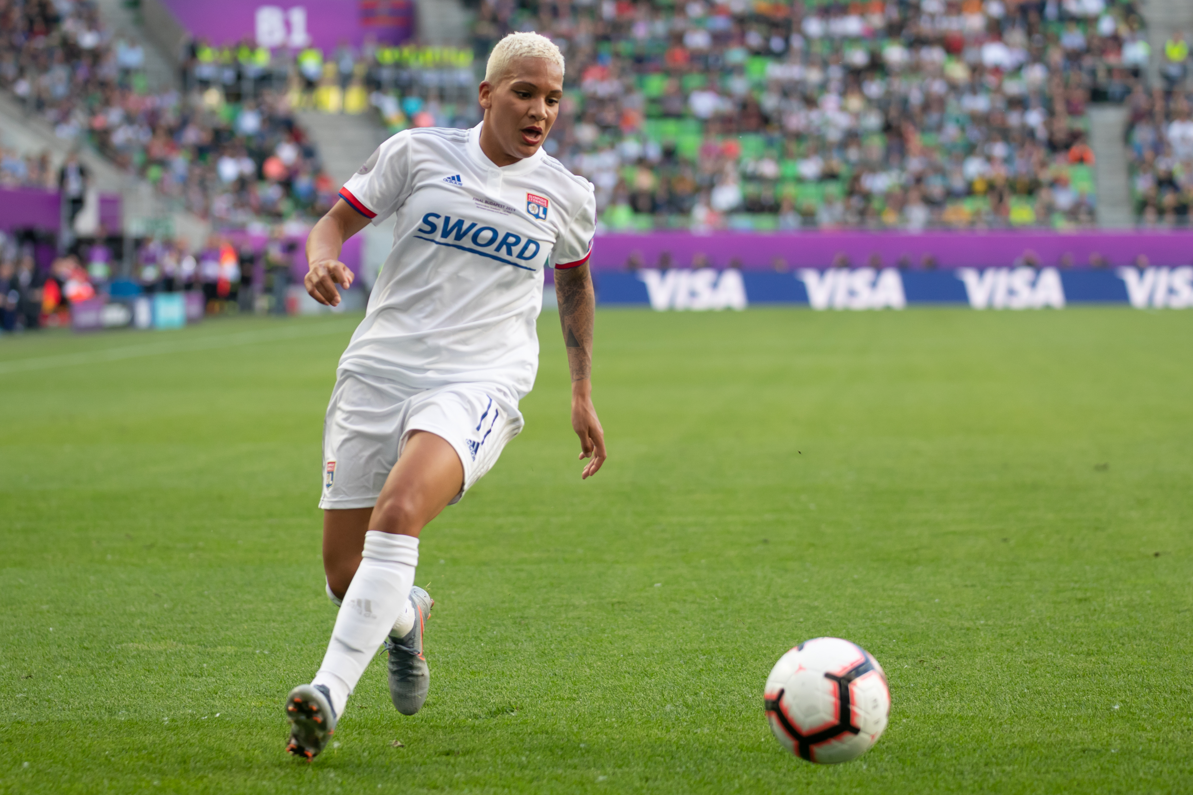 Fußball, Frauen, UEFA Women's Champions League, Olympique Lyonnais - FC Barcelona; Shanice van de Sanden (Olympique Lyon, 11); Freisteller, Einzelbild, Aktion, action